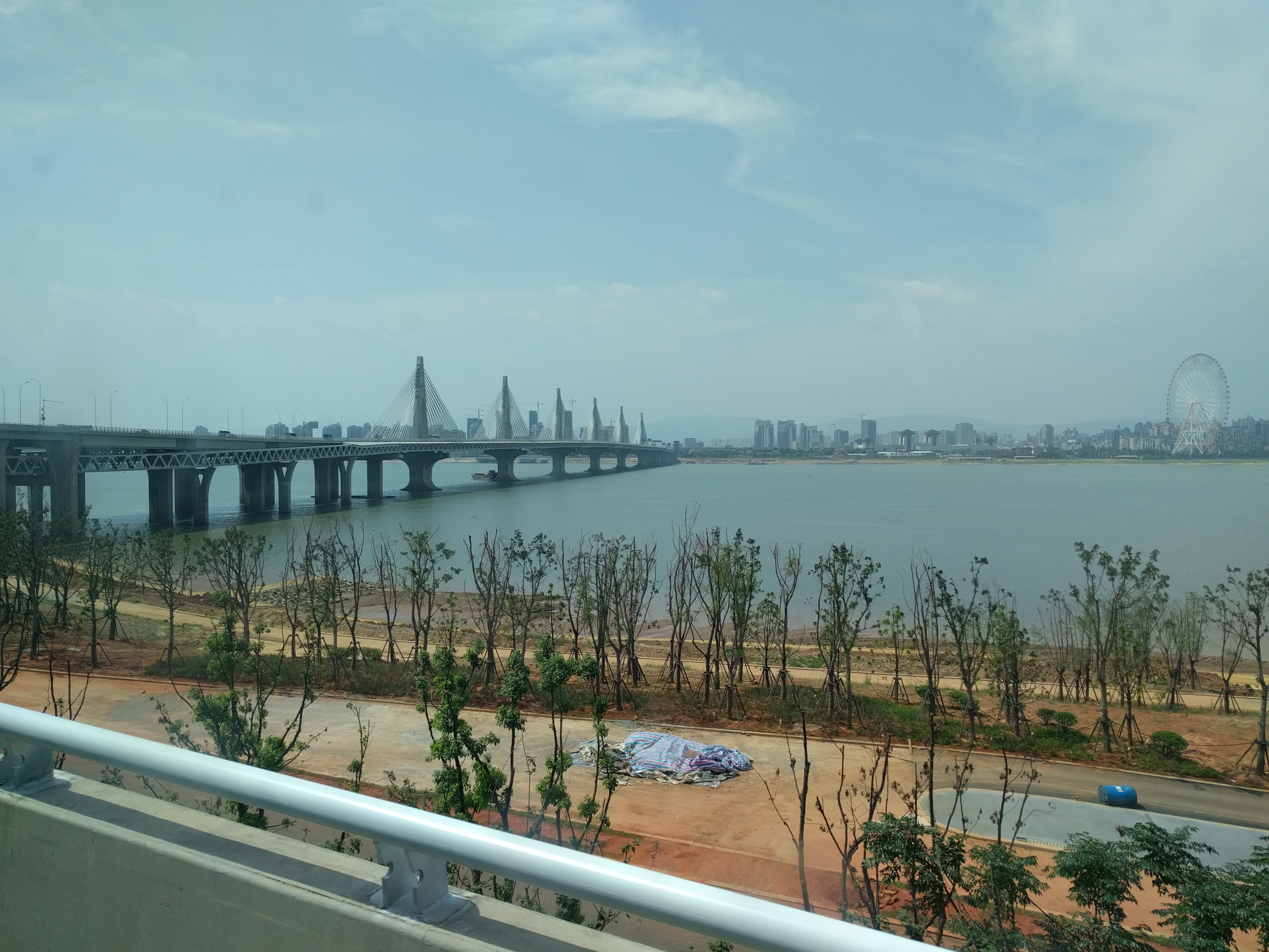 朝阳大桥。